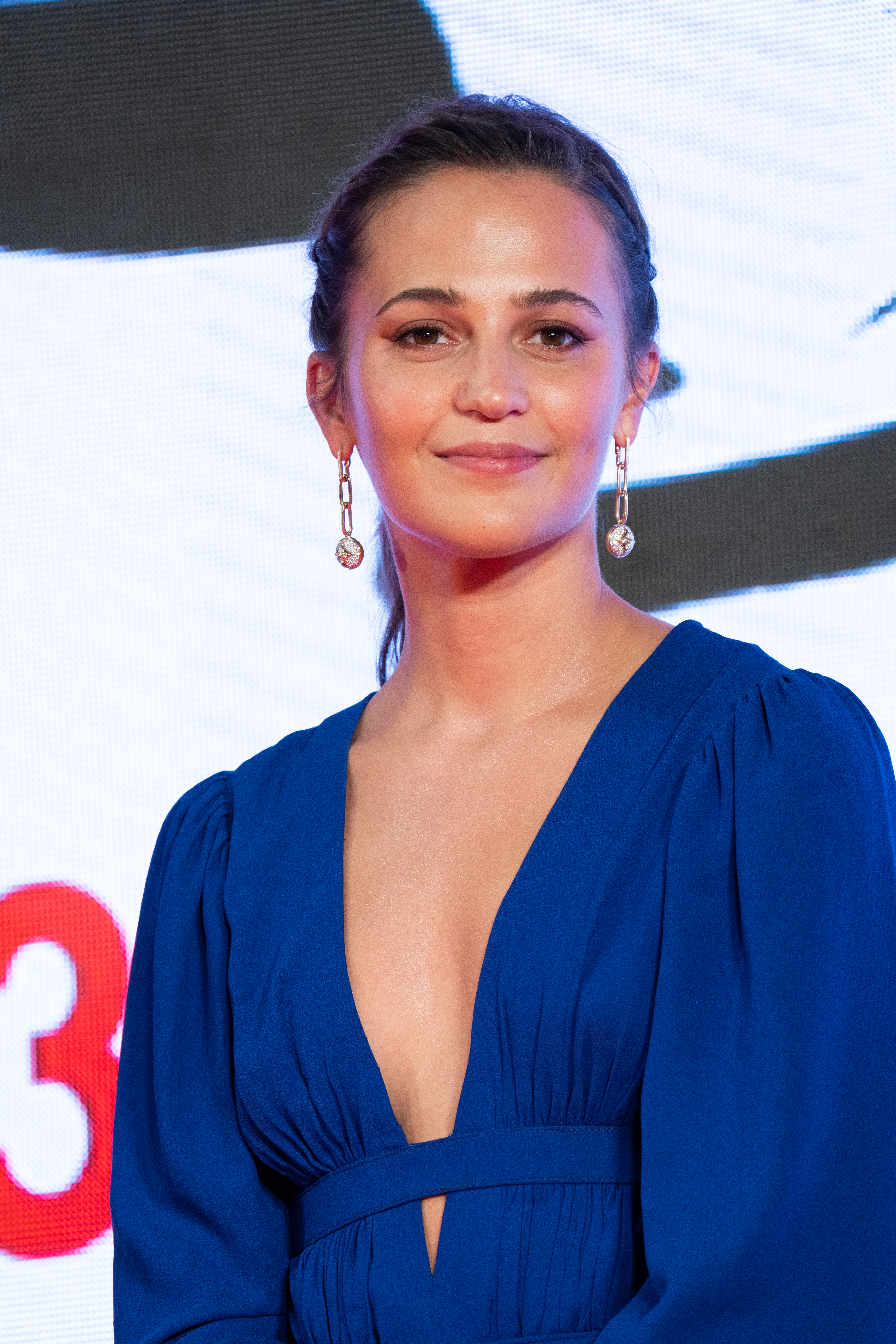 第32回 東京国際映画祭 オープニングセレモニー アリシア・ヴィキャンデル (アースクエイクバード)